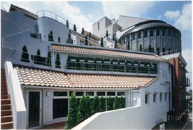 校舎外観テラス